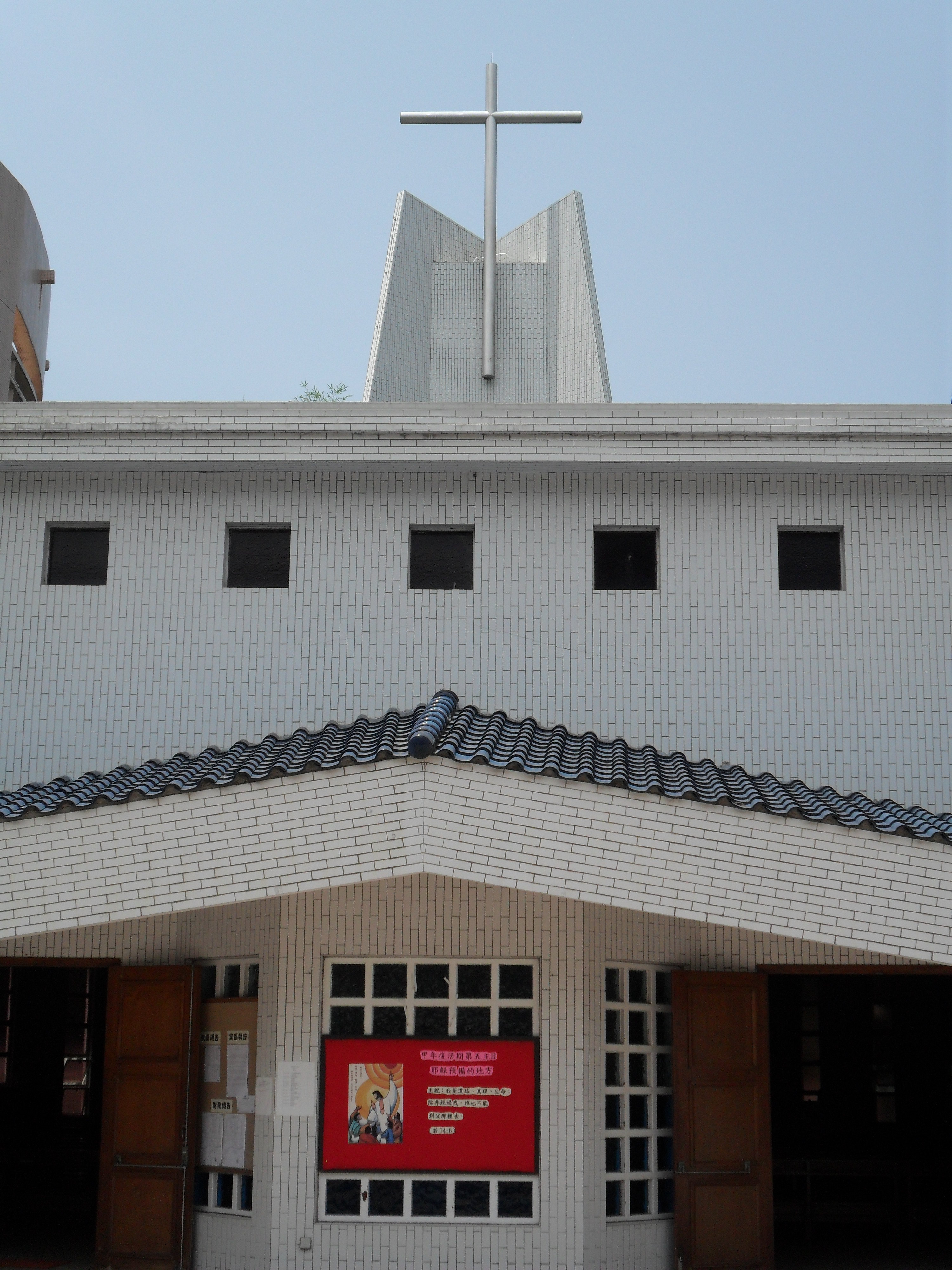 中文（香港）: 基督之母堂, 香港, 中國